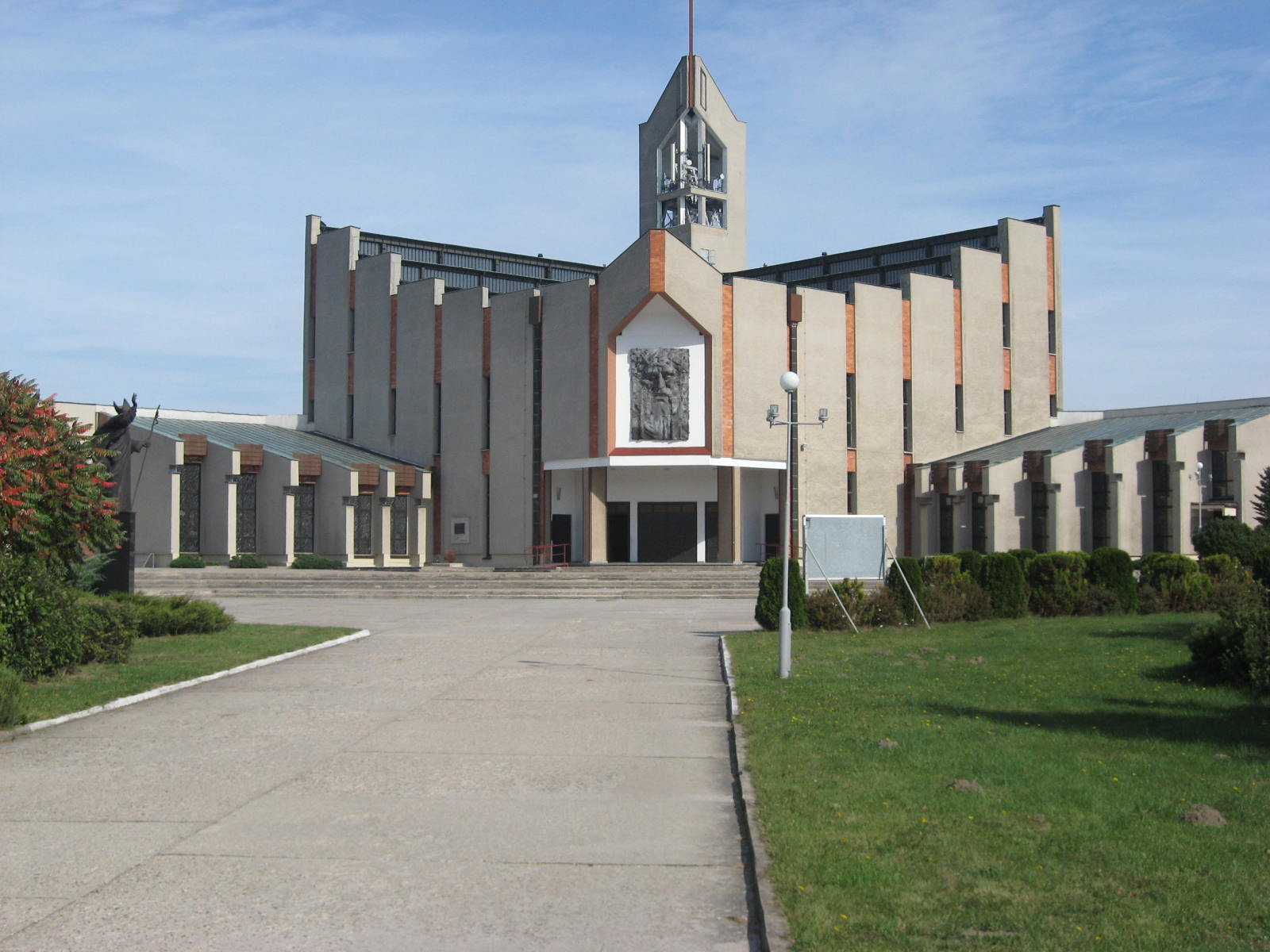 Widok ogólny kościoła 01